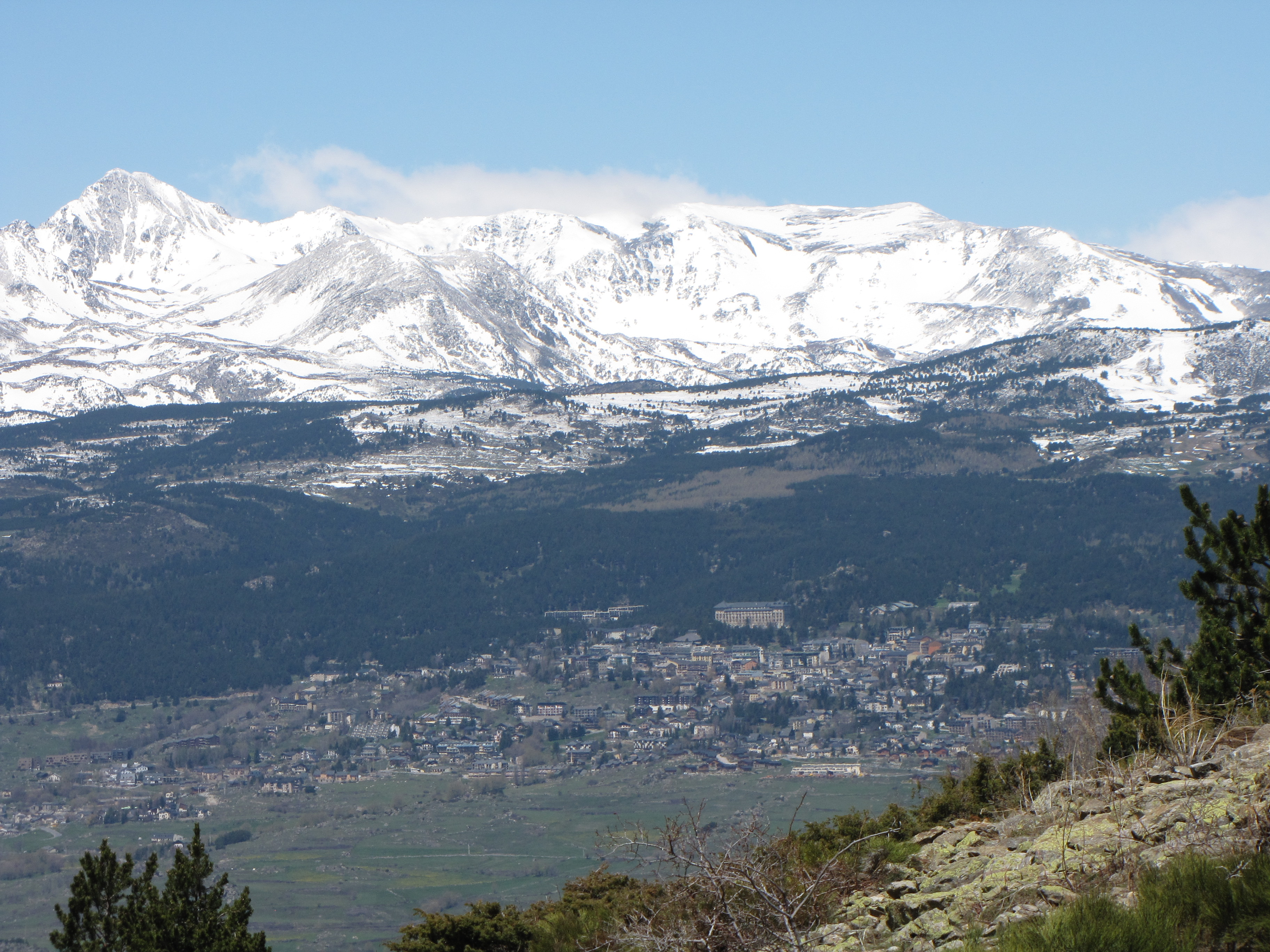 Font-Romeu-Odeillo-Via et le massif du Carlit. Pic Carlit à gauche.